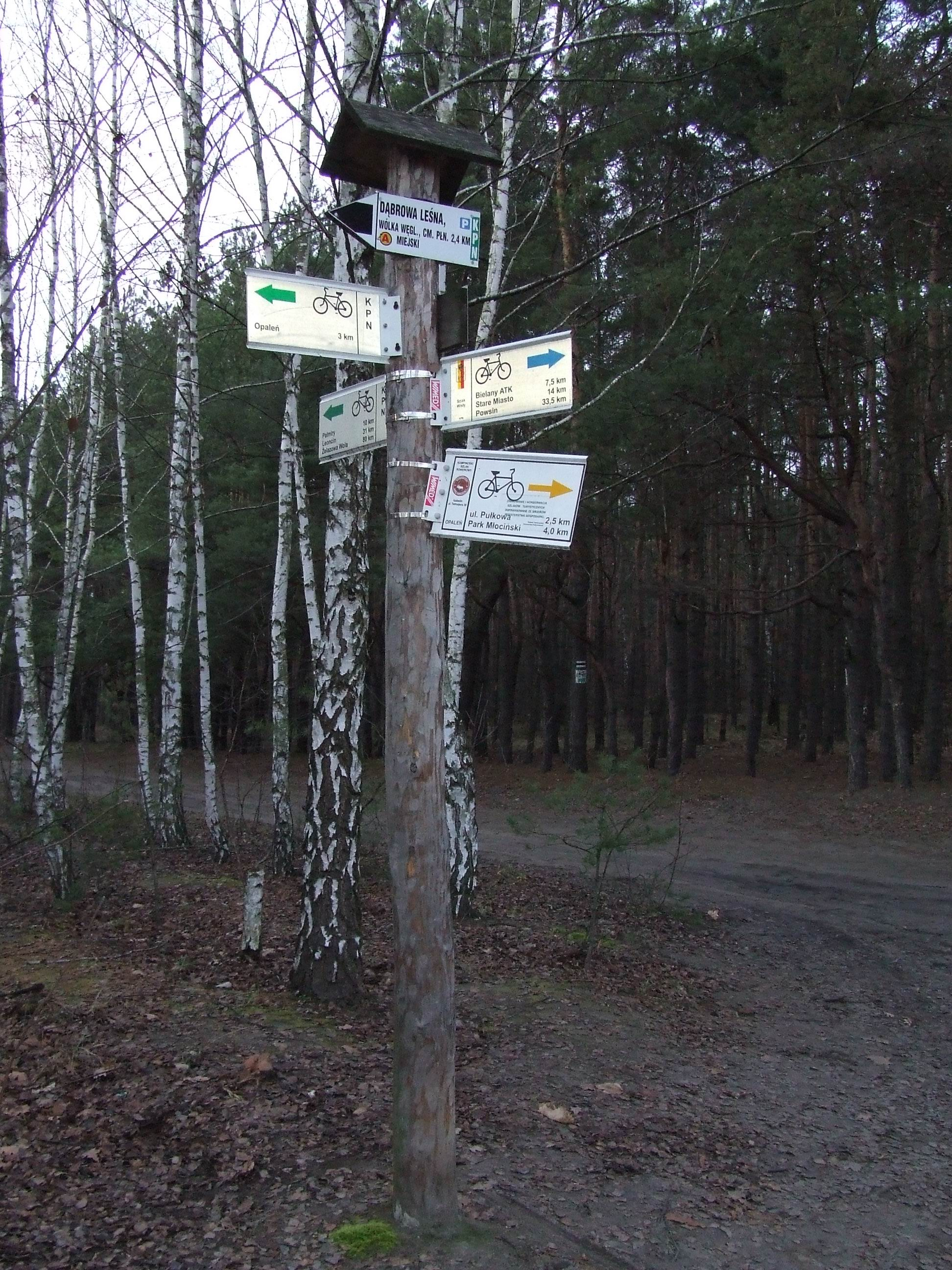 Dąbrowa Leśna, Łomianki - rozwidlenie szlakow rowerowych w Puszczy Kampinoskiej